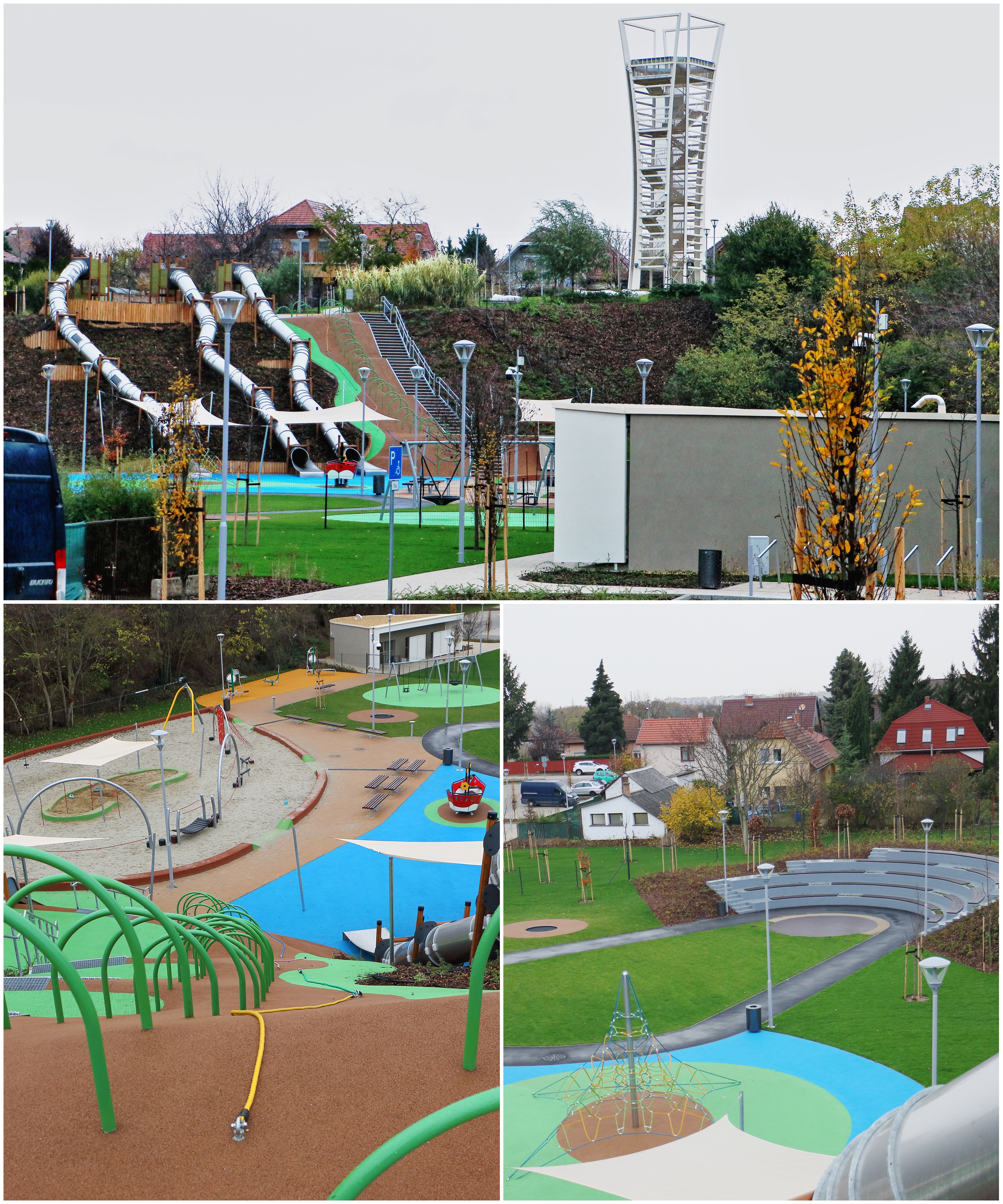 Reformátorok tere játszópark esőben, montázs